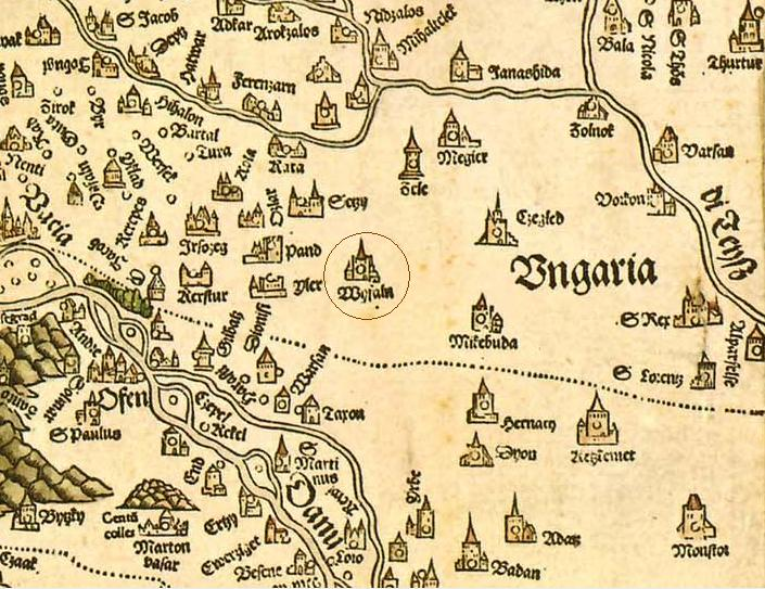 Wyfalu (a mai Monorierdő) Lázár deák 1510-es térképén